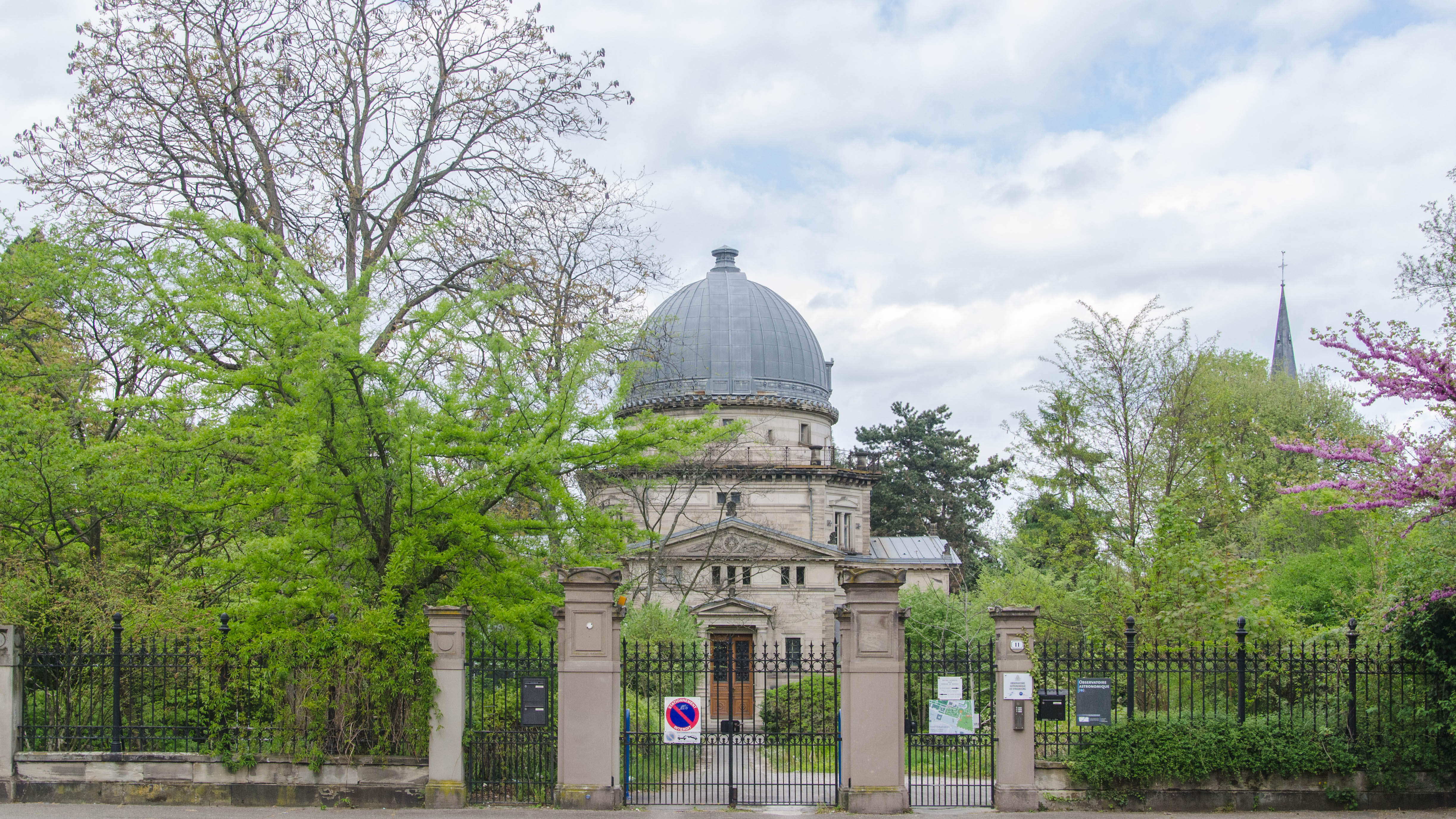 Cet observatoire a fourni l'heure la plus précise à l'empereur habitant non loin à la fin du XIXe siècle.